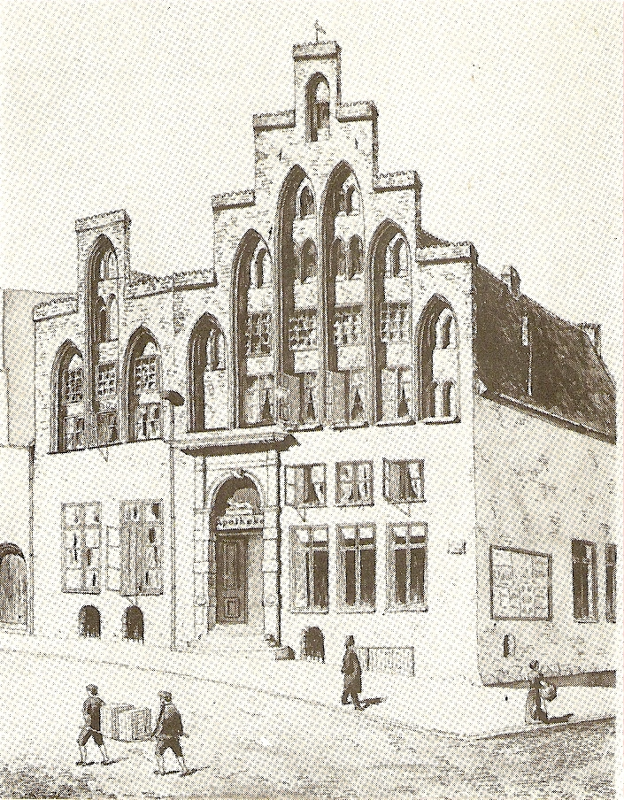 Ansicht des Vordergiebels der Löwenapotheke Ecke Johannisstraße/Königstraße in Lübeck, Federzeichnung aus der Mitte des 19. Jahrhunderts.